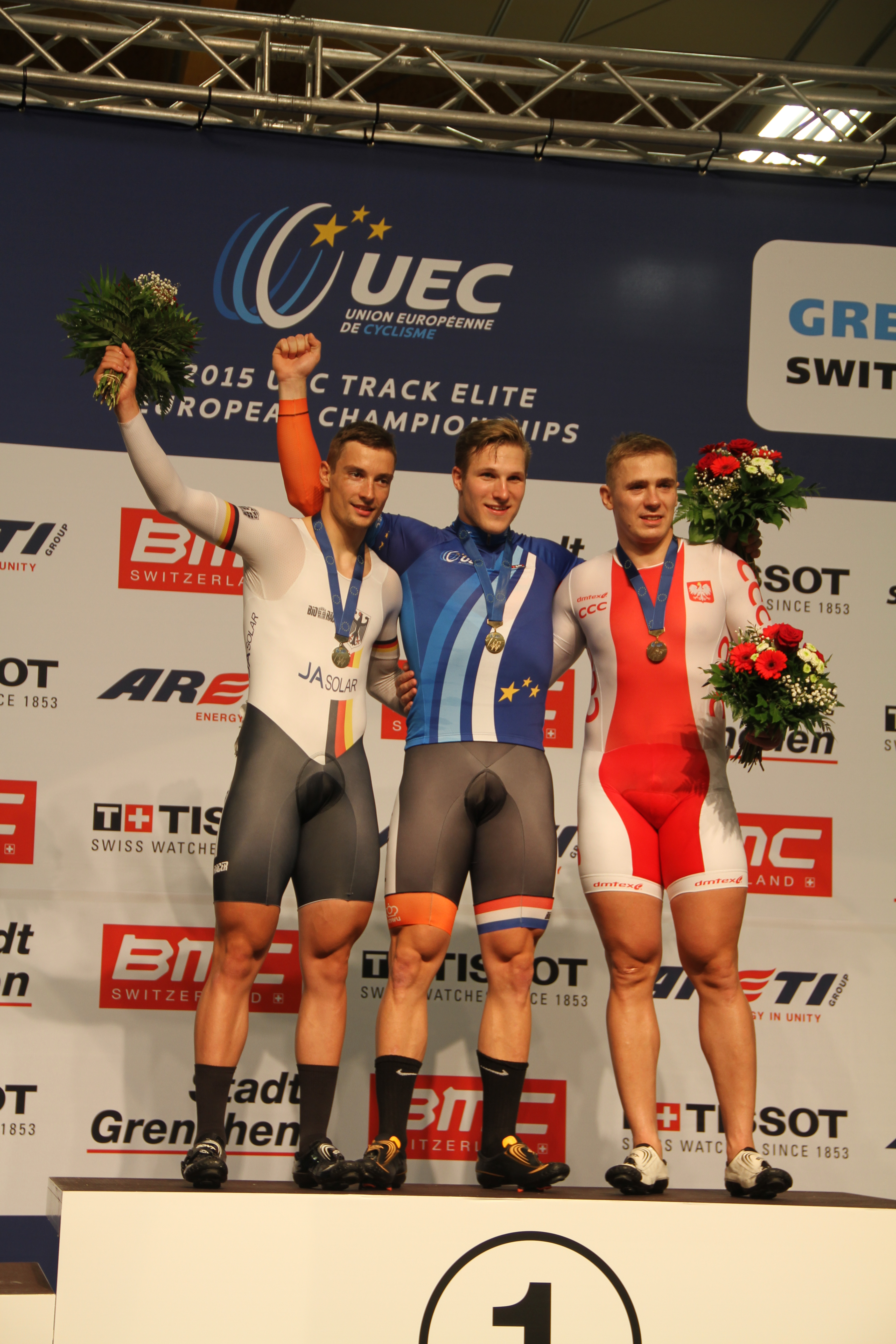 Podium Sprint der Männer (v.l.n.r.) Max Niederlag, Jeffrey Hoogland, Damian Zielinski The making of this document was supported by the Community-Budget of Wikimedia Germany.